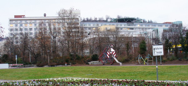 Stuttgart Katharinenhospital Selbst fotografiert von user:Enslin At 6 Jan 2006 in Stuttgart